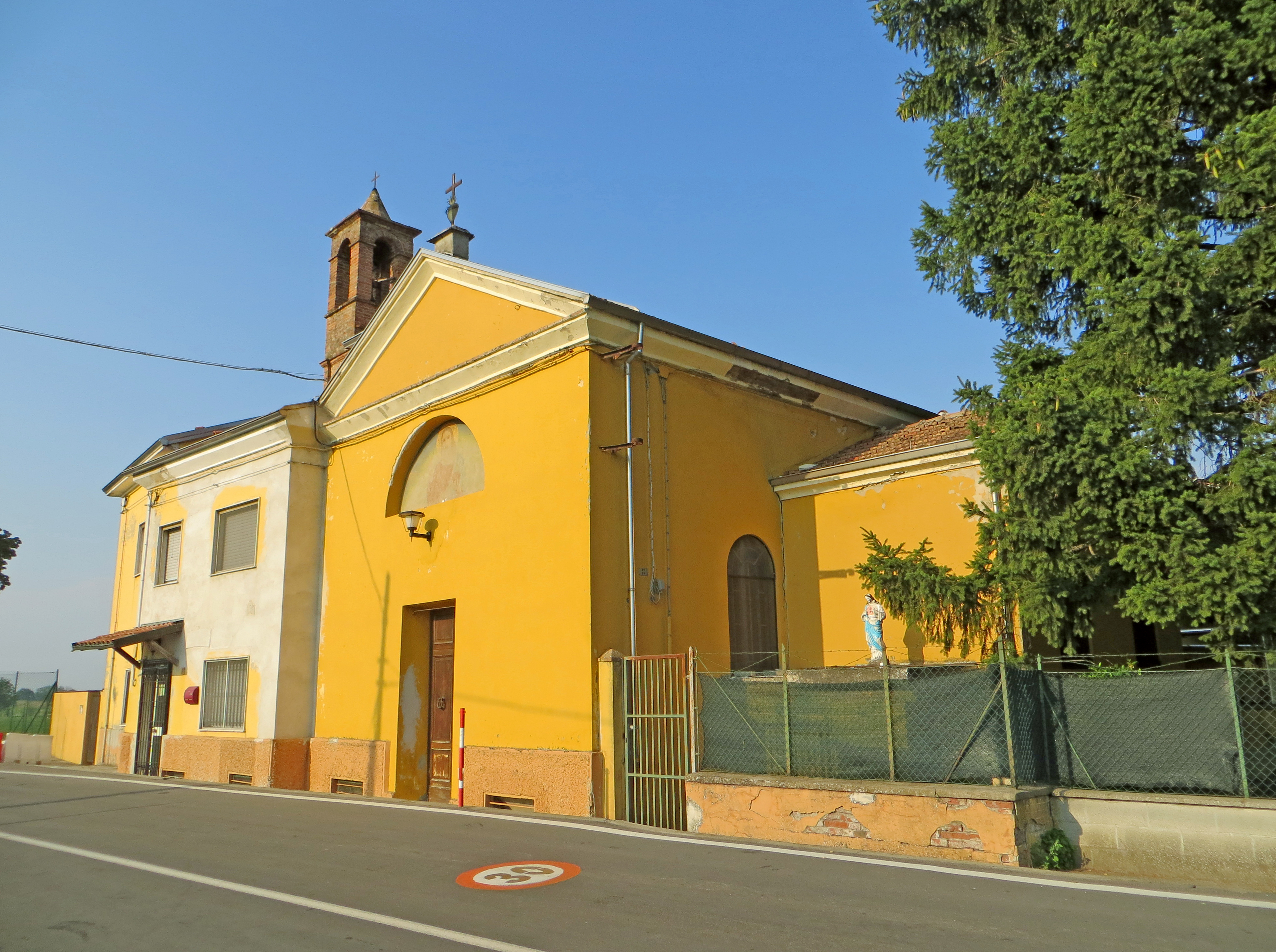 Oratorio del Sacro Cuore e di Santa Teresa di Gesù Bambino (Pontetaro, Fontevivo) - facciata e lato sud